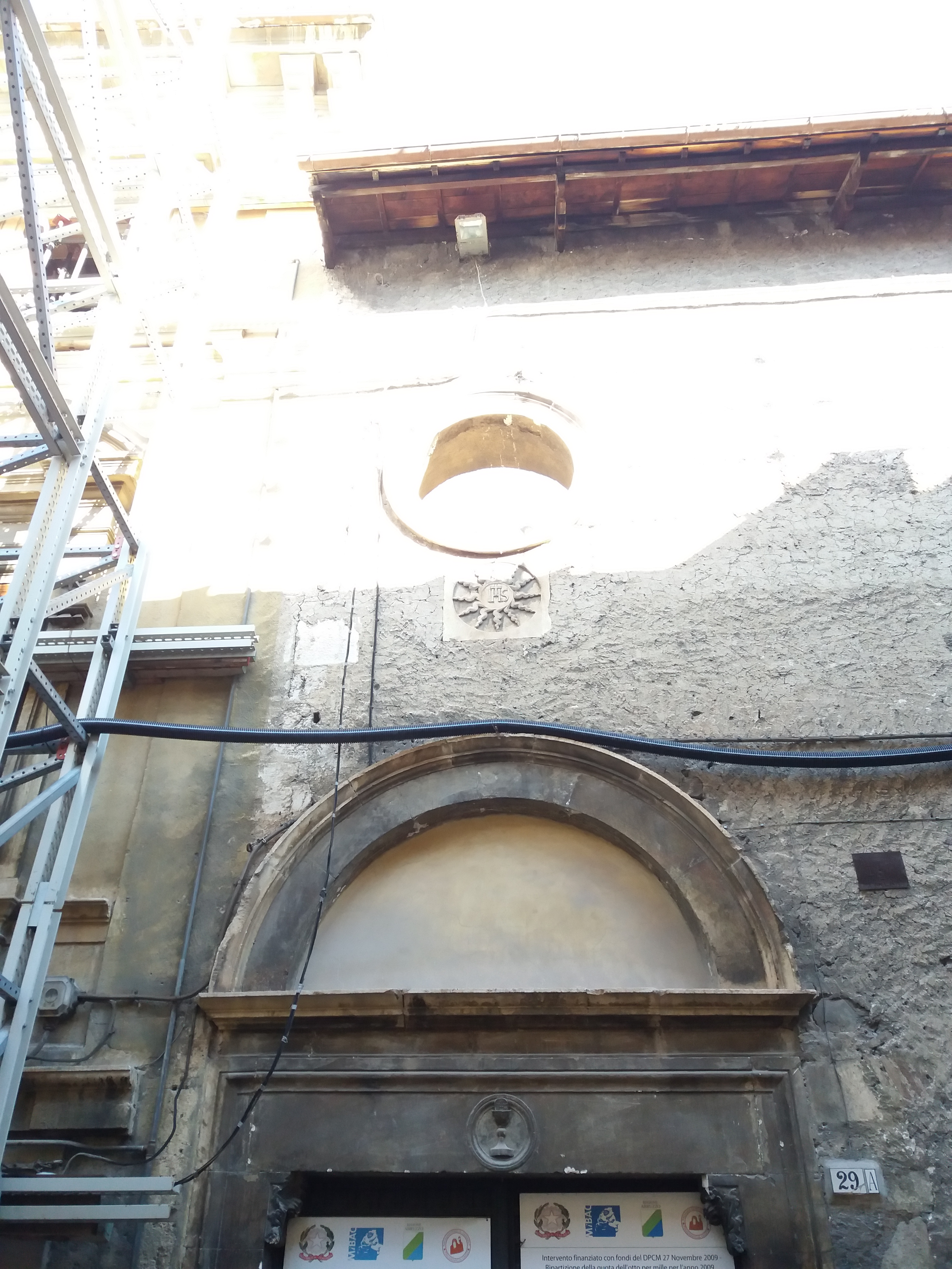 L'Aquila: Chiesa della Beata Antonia